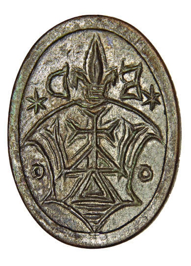 Печатка володимирського земскього судді Богдана Костюшковича Хоболтовського (1566-1584 рр.) Мідний сплав. Лиття. Гравіювання. 22*17 мм, вис. 28,5 мм, вага 12,9 г